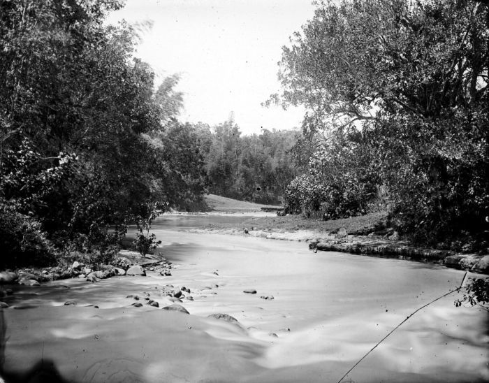 Negatief. Rivier de Brantas, Java